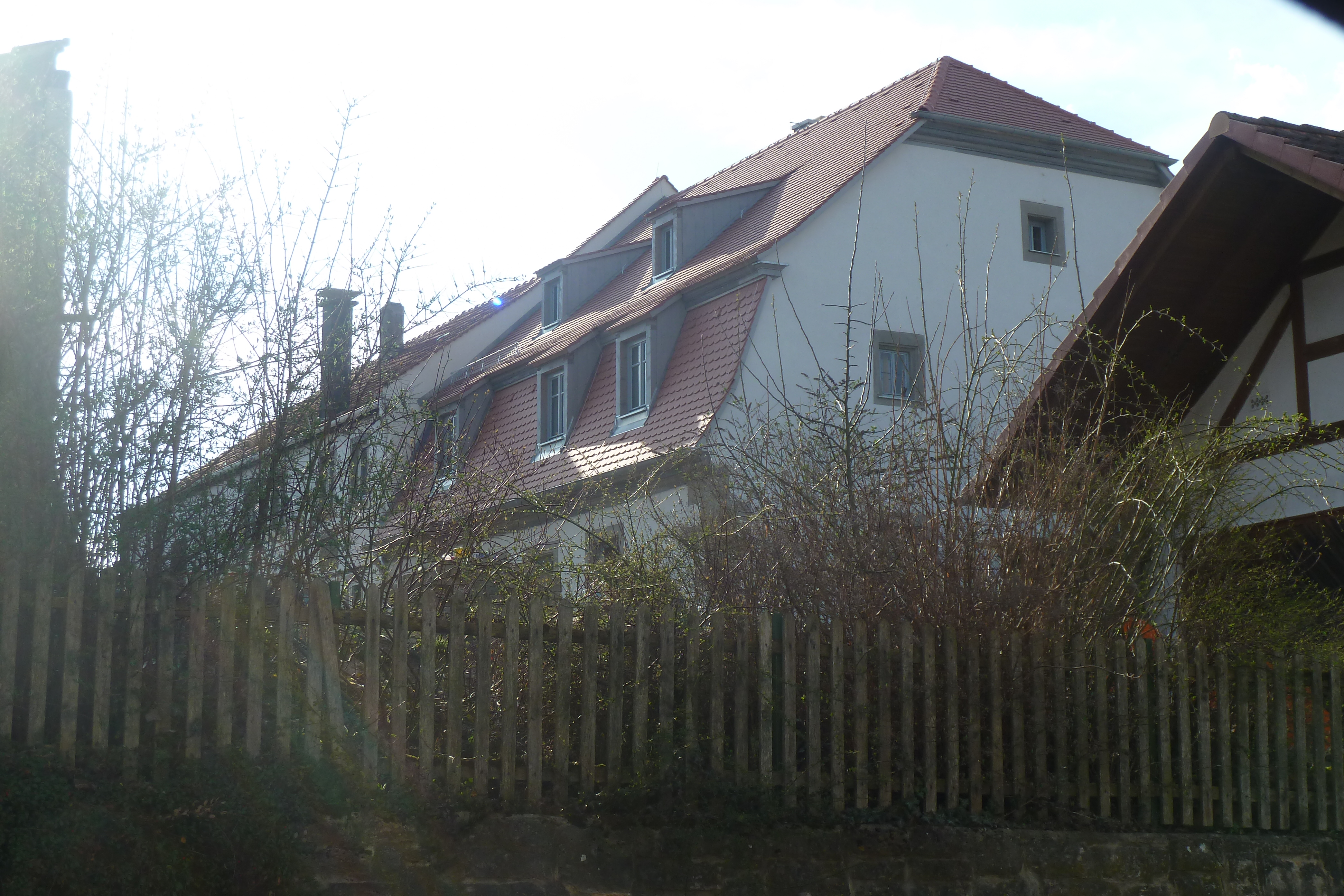 Das Rannunger Schloss aus dem 16. Jh. nach der Renovierung von 2016 / 2017. Ostfassade.